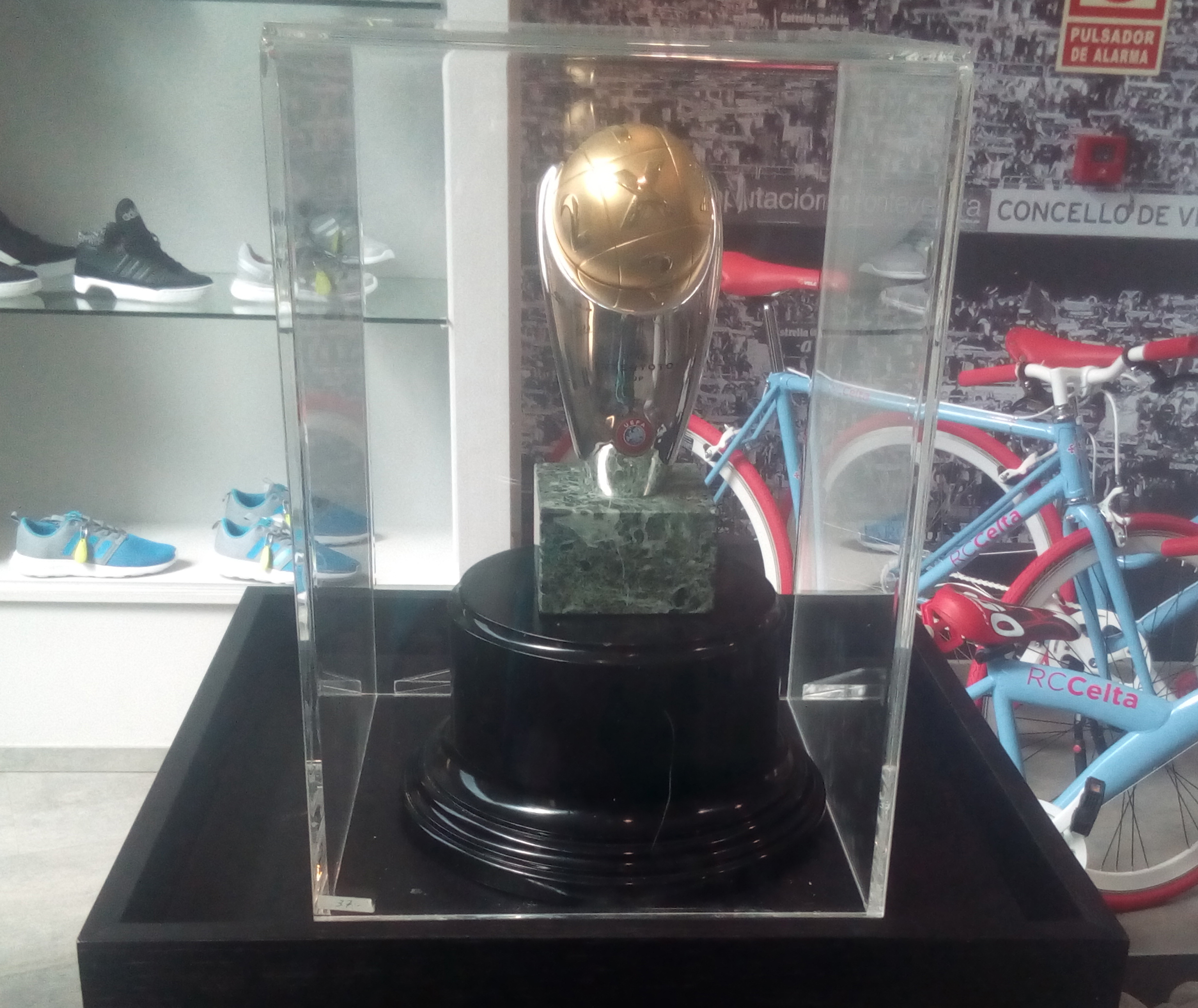 na tenda do clube en Balaídos